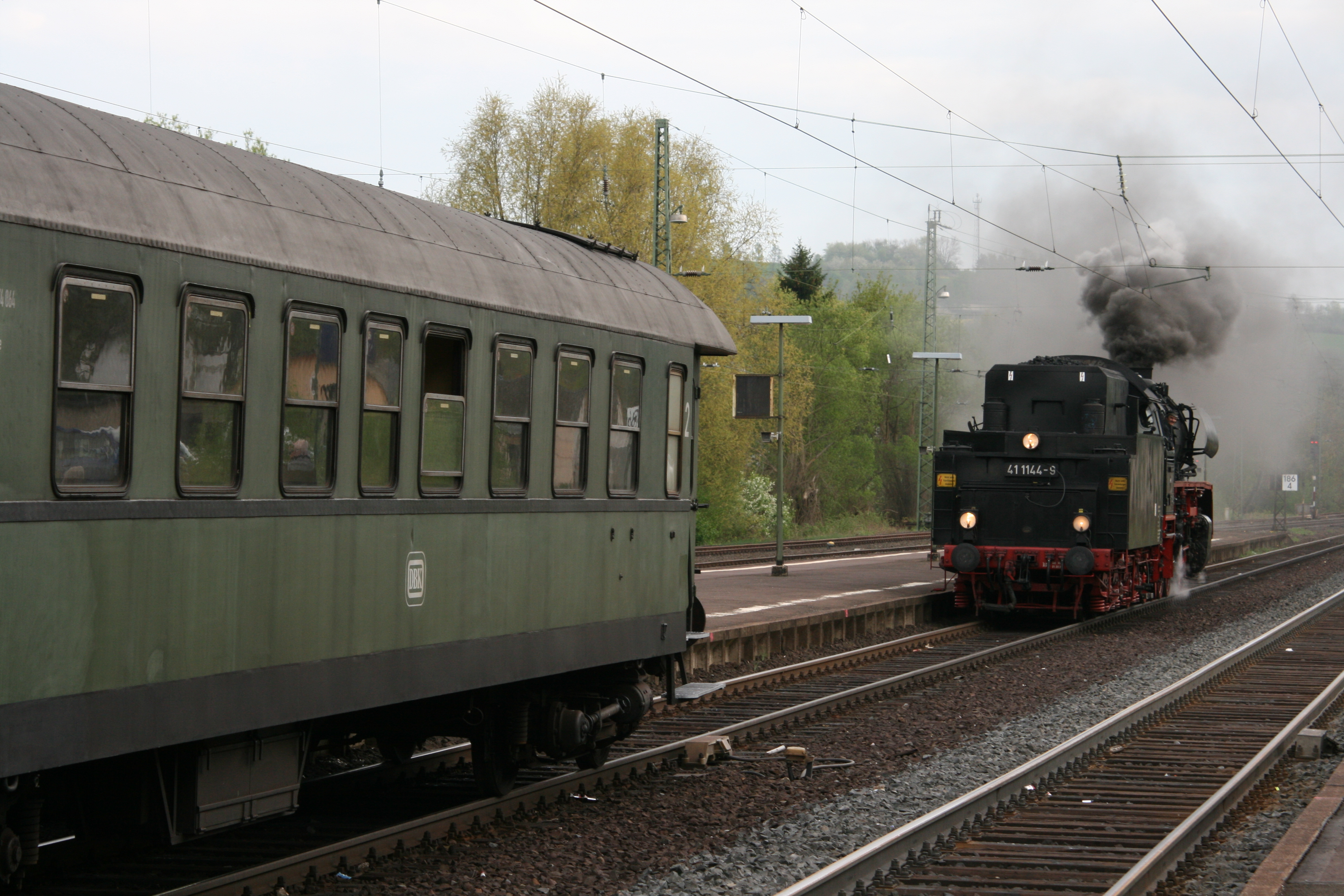 Ein Sonderzug im Bahnhof von Sontra.